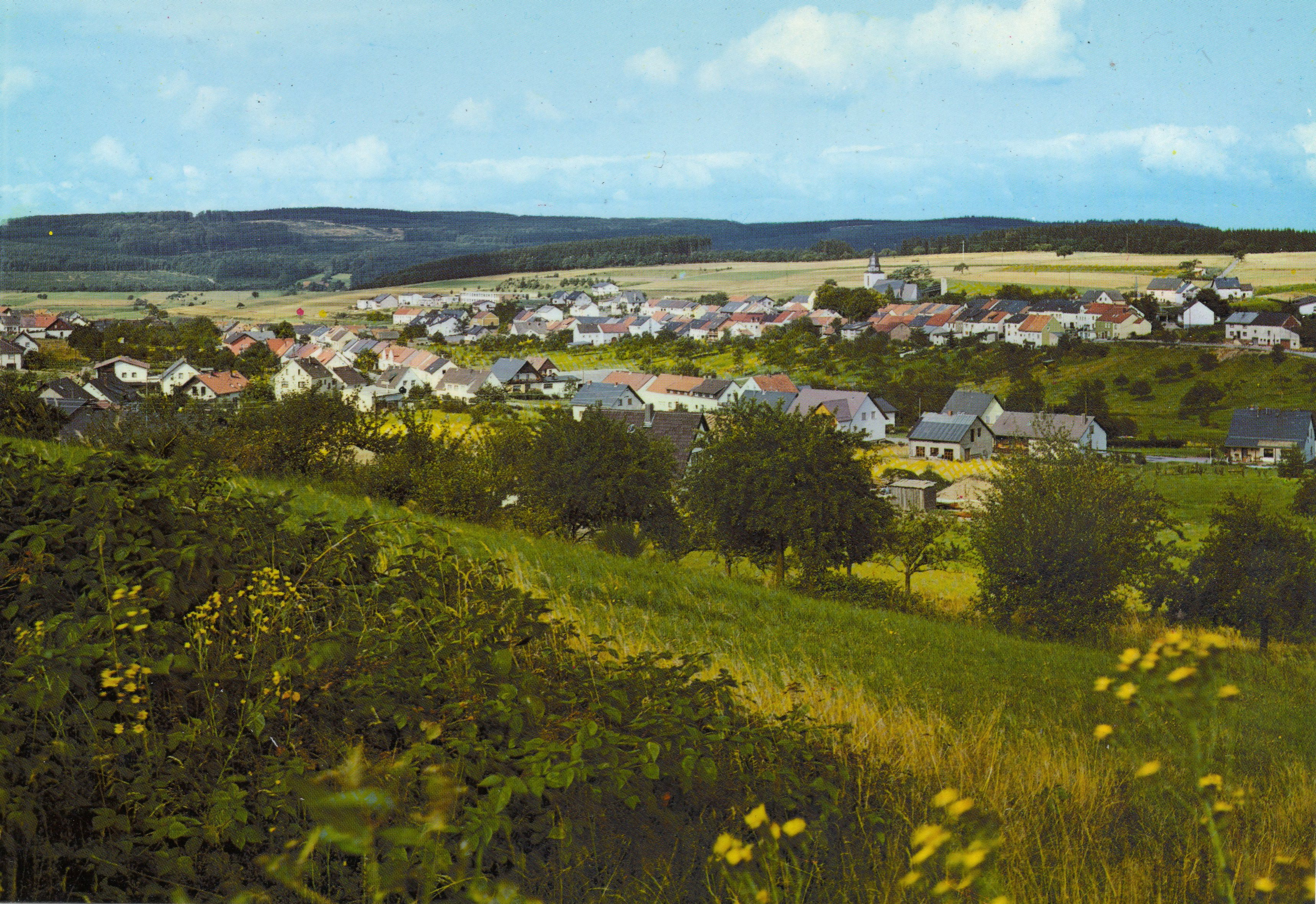 Greimerath bei Trier auf einer Ansichtskarte von 1980